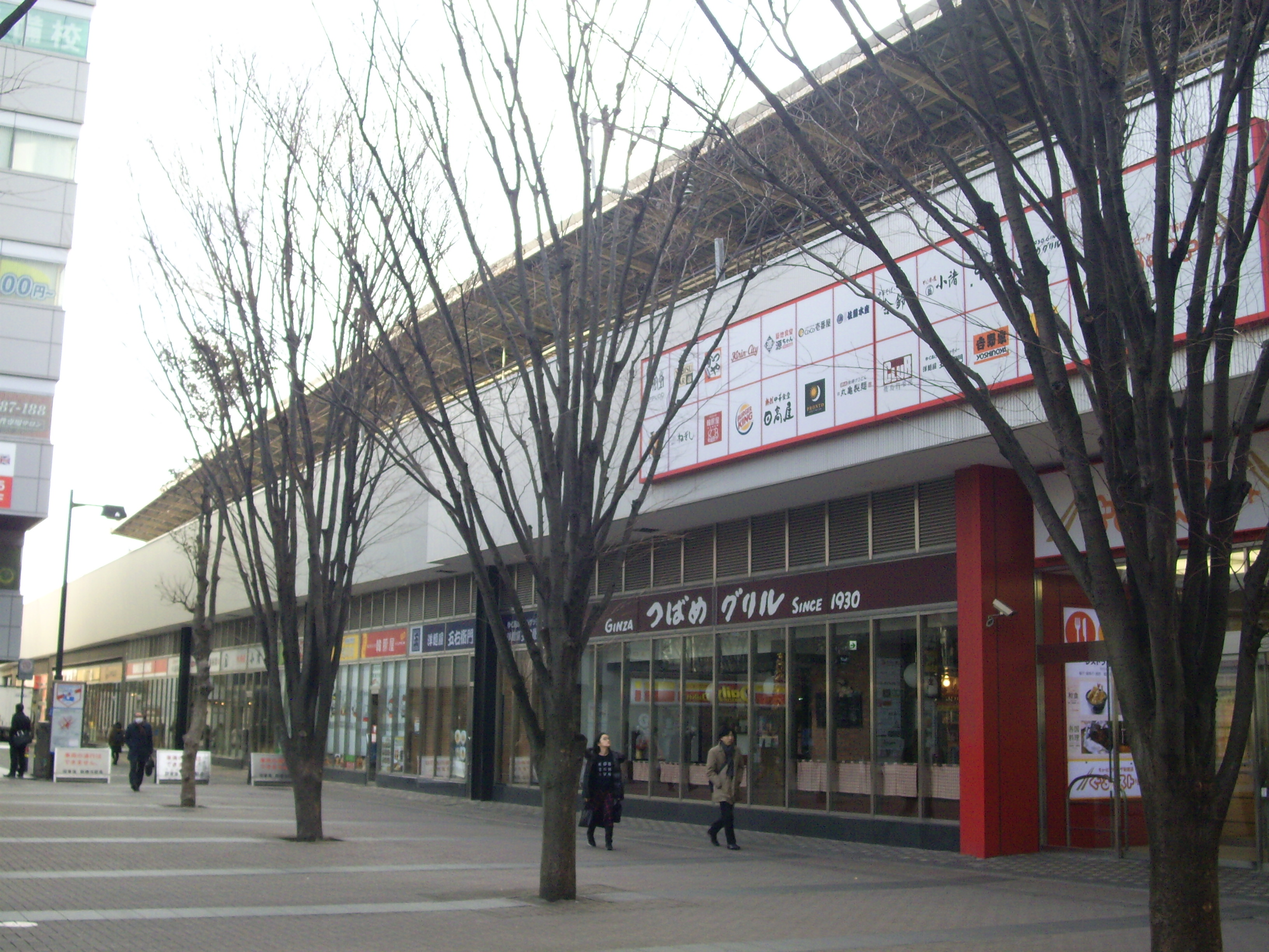 東海道新幹線新横浜駅直下のキュービックプラザ新横浜別館「ぐるめストリート」 ㊟カメラを起動すると日付機能が出荷時のものに初期化されるため、ファイル履歴の投稿日時とメタデータの原画像データの生成日時が異なります（本概要欄の下記日付が撮影日）